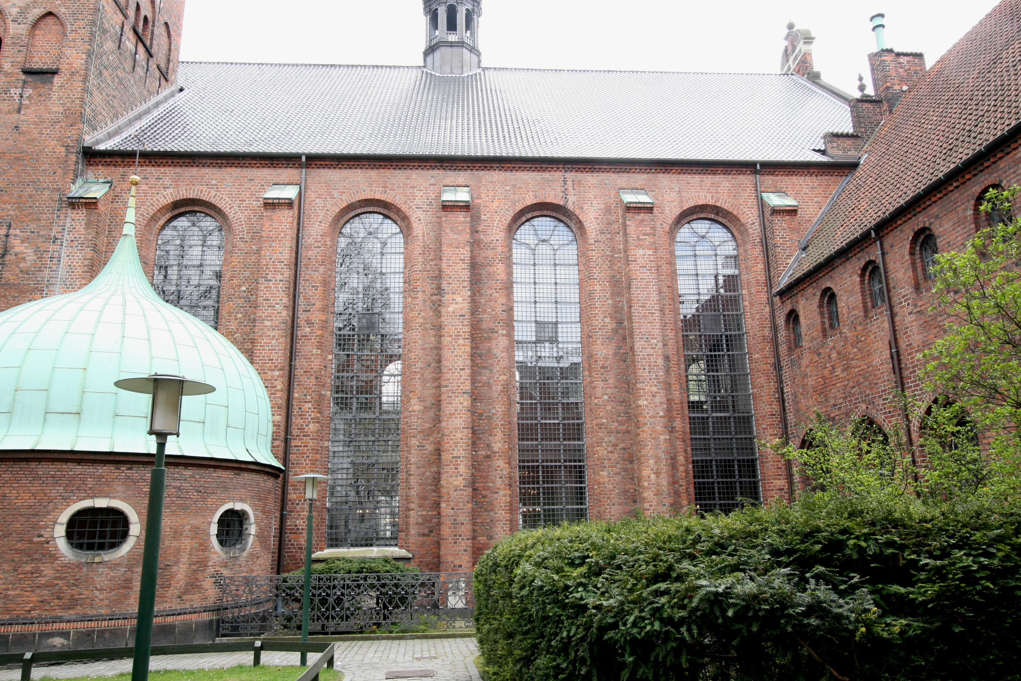 Helligåndskirken, Copenhagen, Denmark. From north.